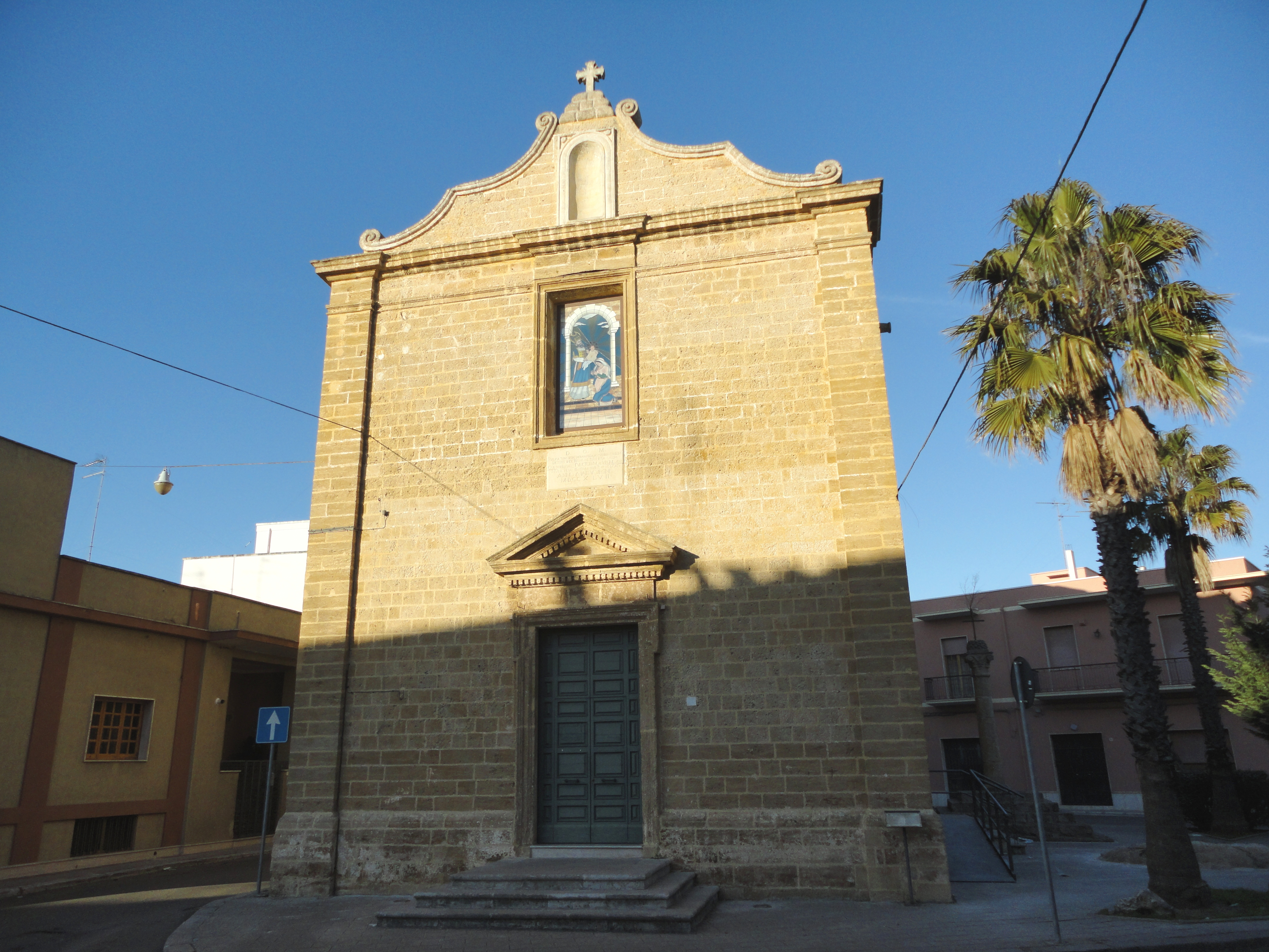 Chiesa della Purificazione Trepuzzi, Lecce